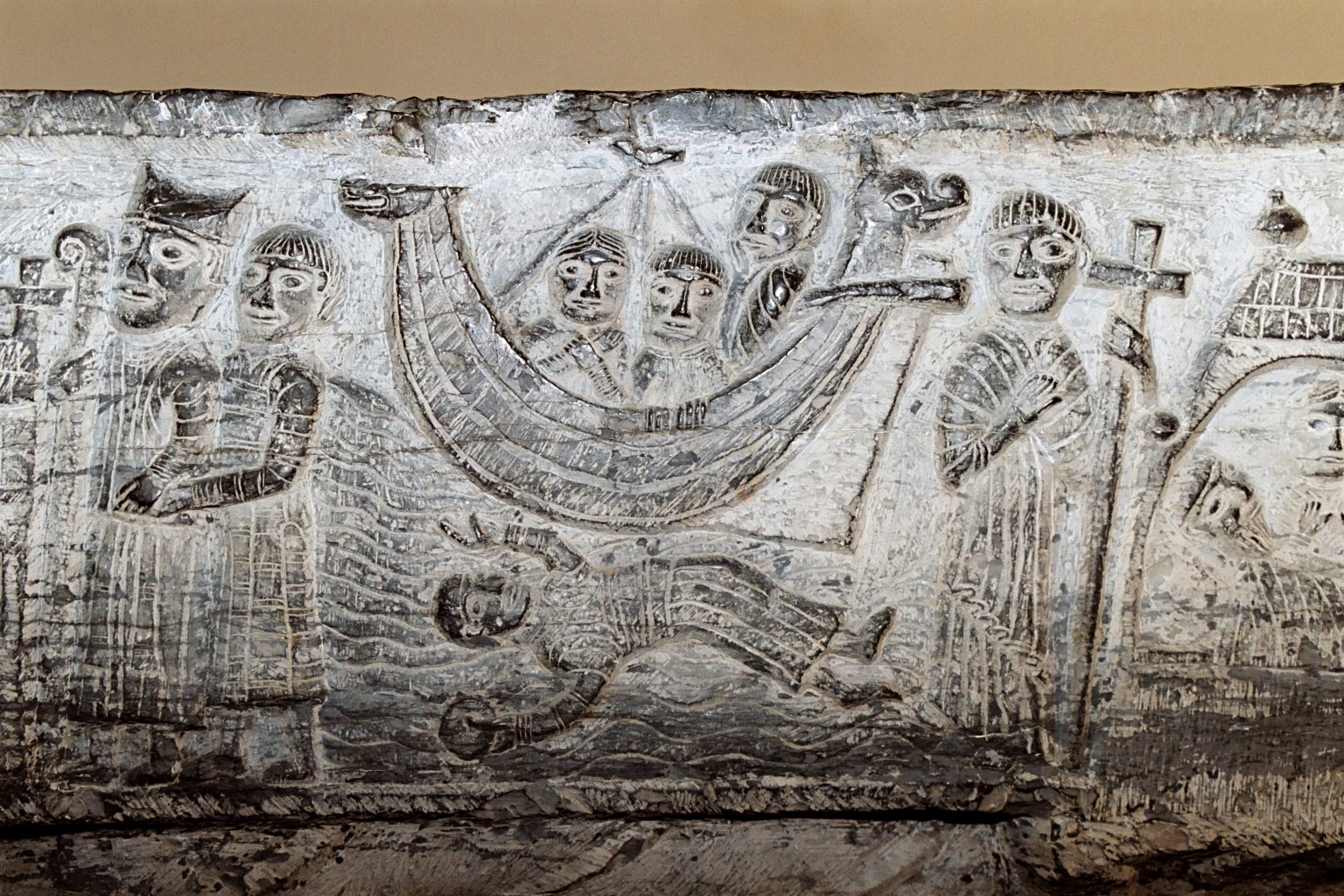 Belgique - Flandre - Fonts baptismaux romans de Zedelgem